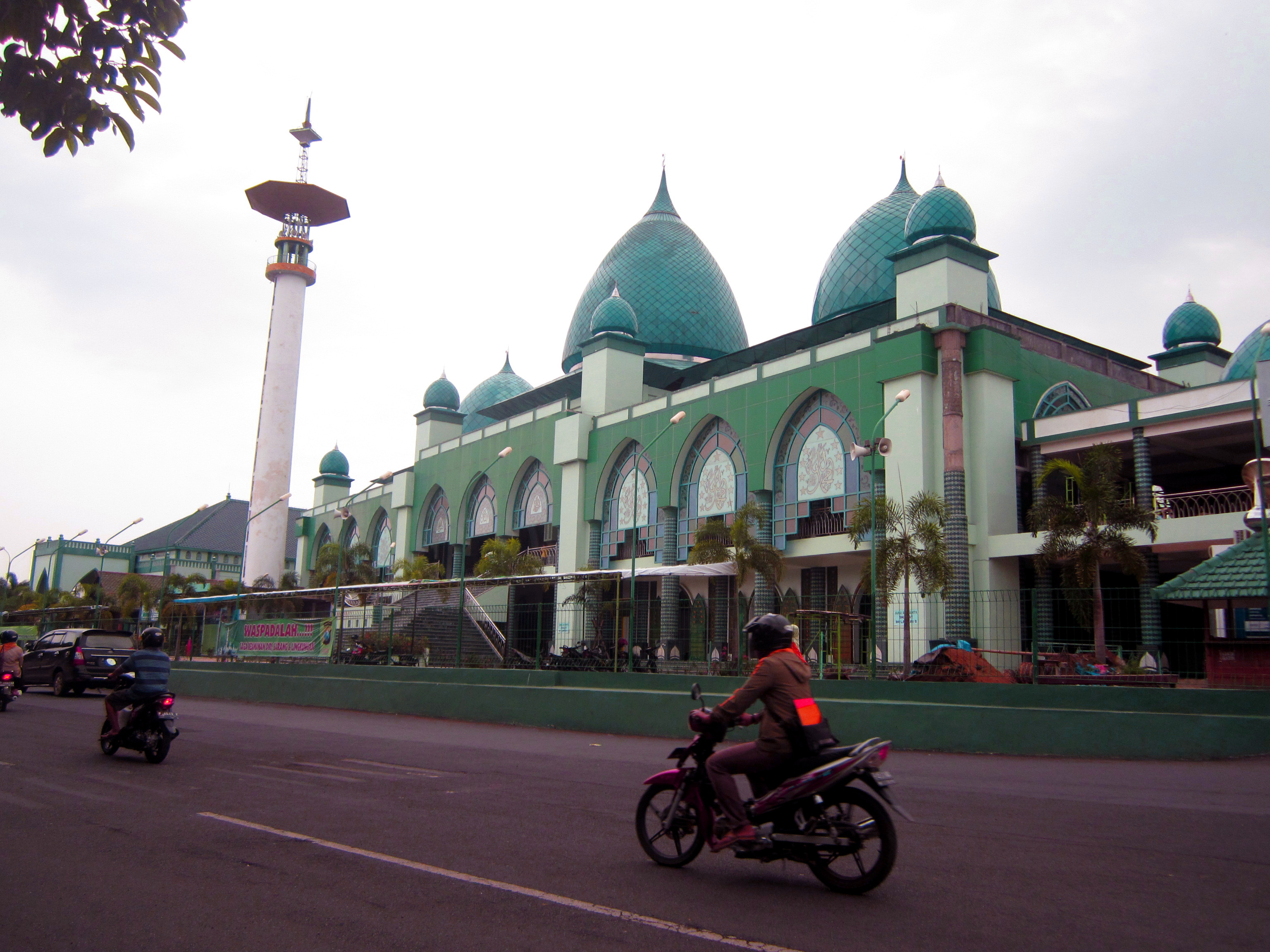 Masjid Agung Baiturrahman Aryphrase (bicara) 12 Juni 2013 04.34 (UTC)